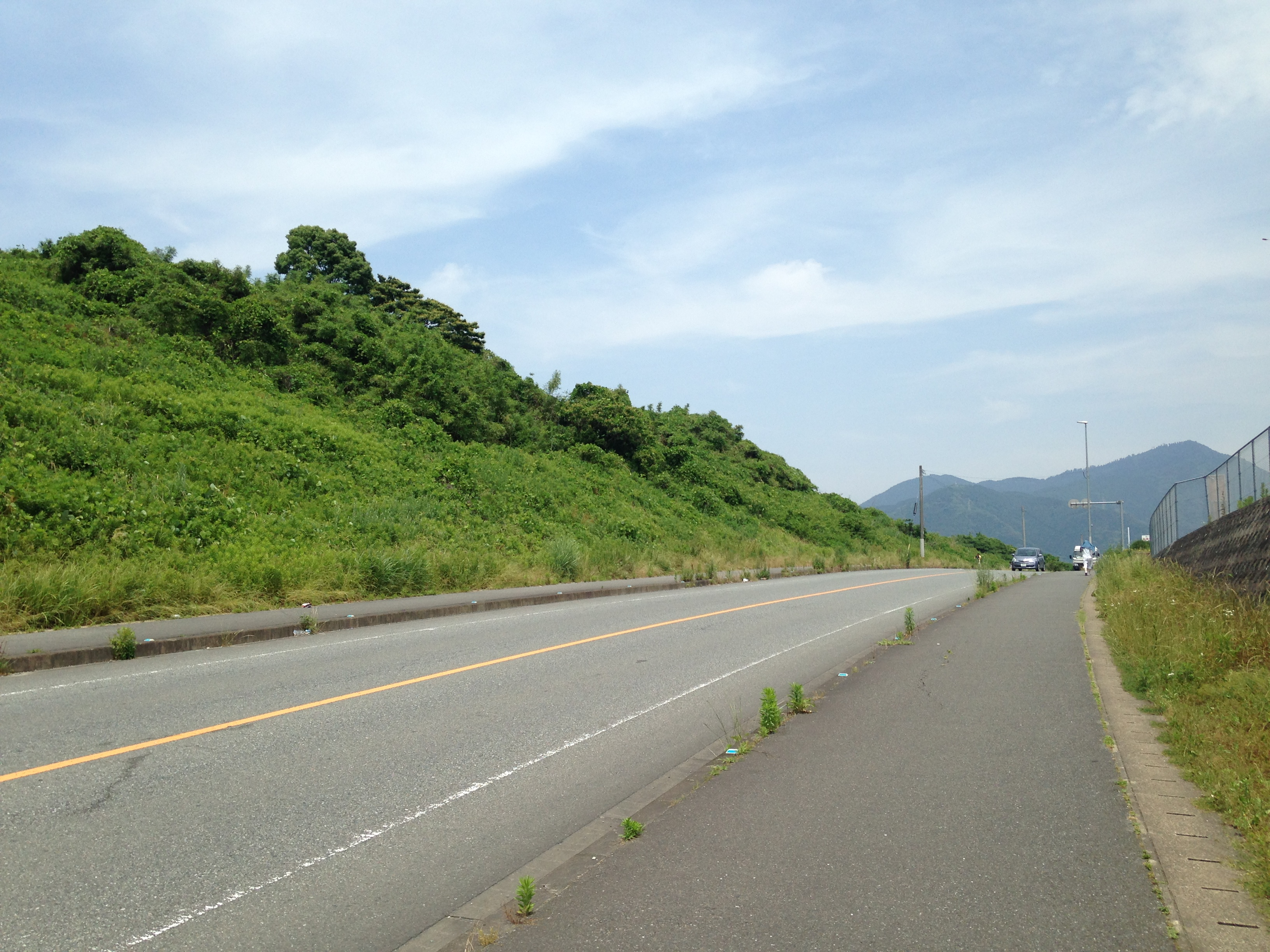 志免鉱業所跡付近の福岡県道91号。左側はボタ山